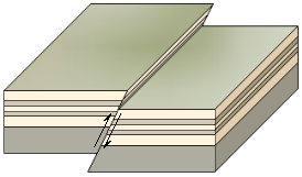 Autor: Usuario:Luis María Benítez